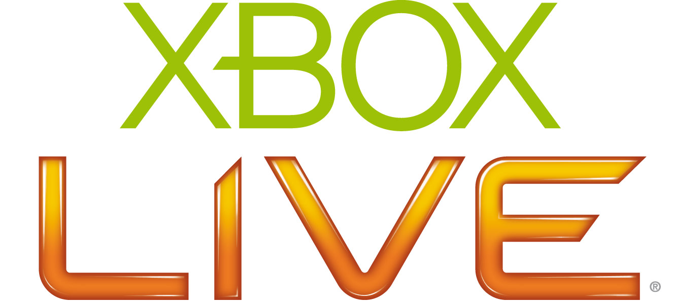 Xbox Live é o serviço online do Xbox